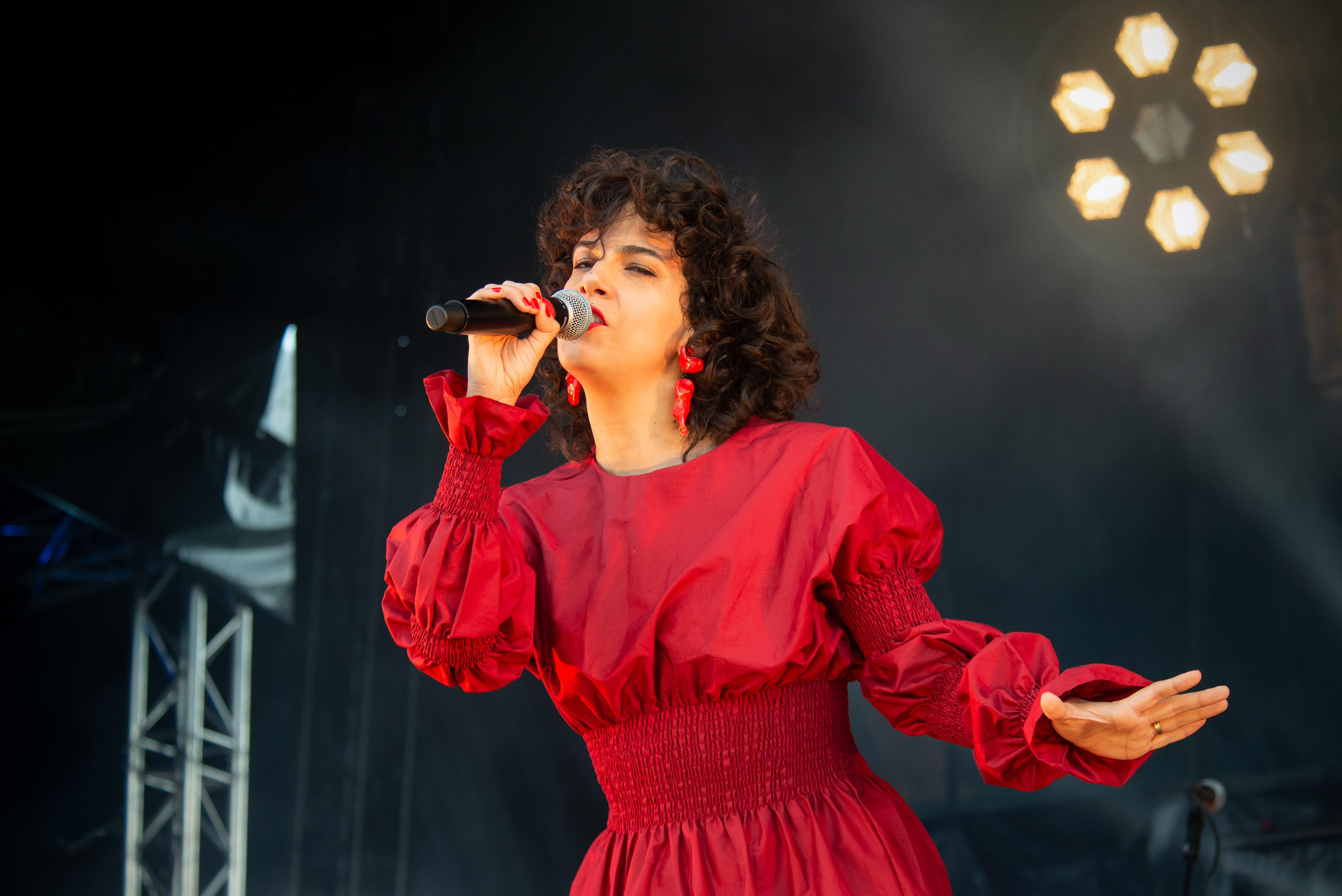 Concert de Céu, festival Les Escales, Saint-Nazaire, juillet 2019.